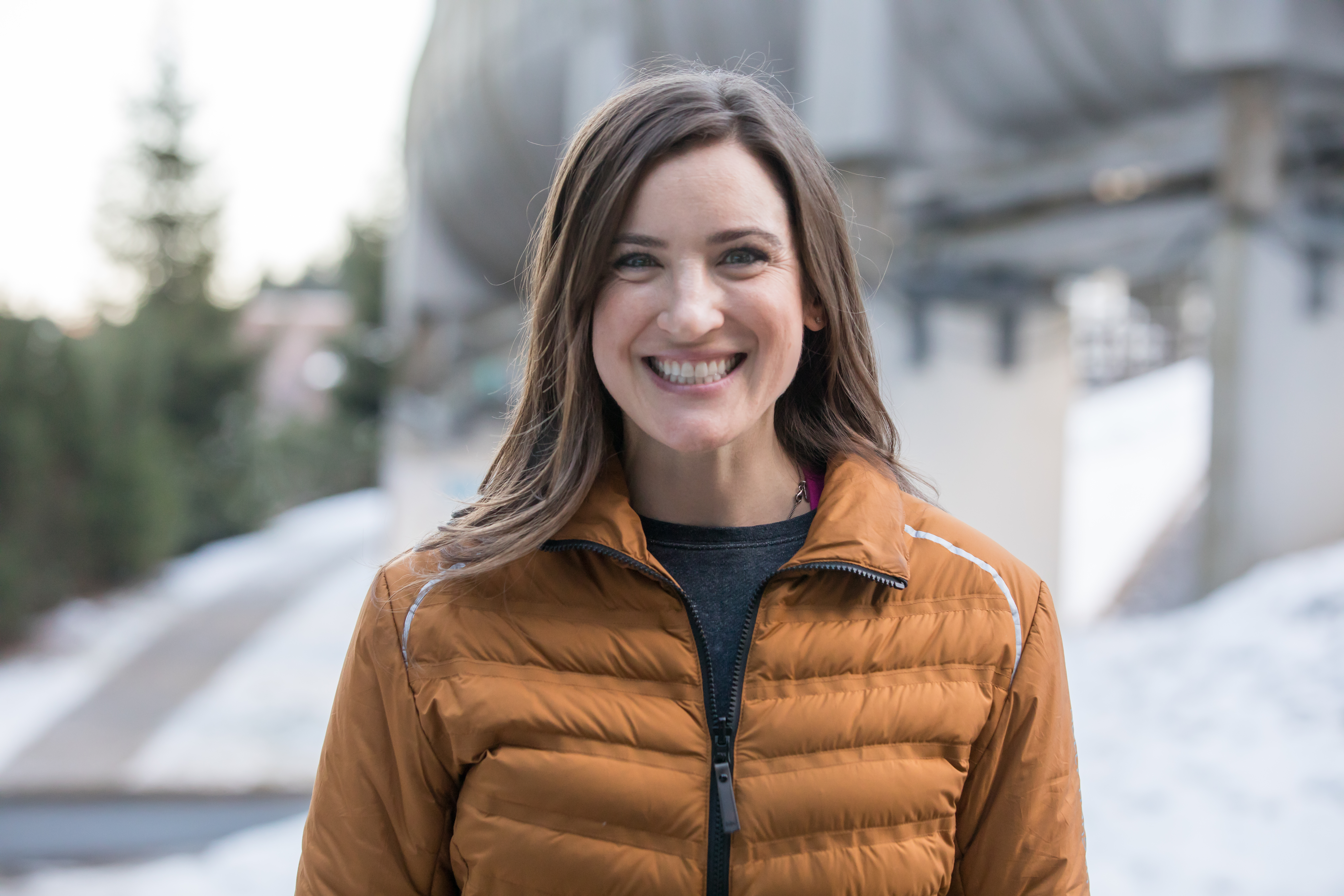 Bree Schaaf